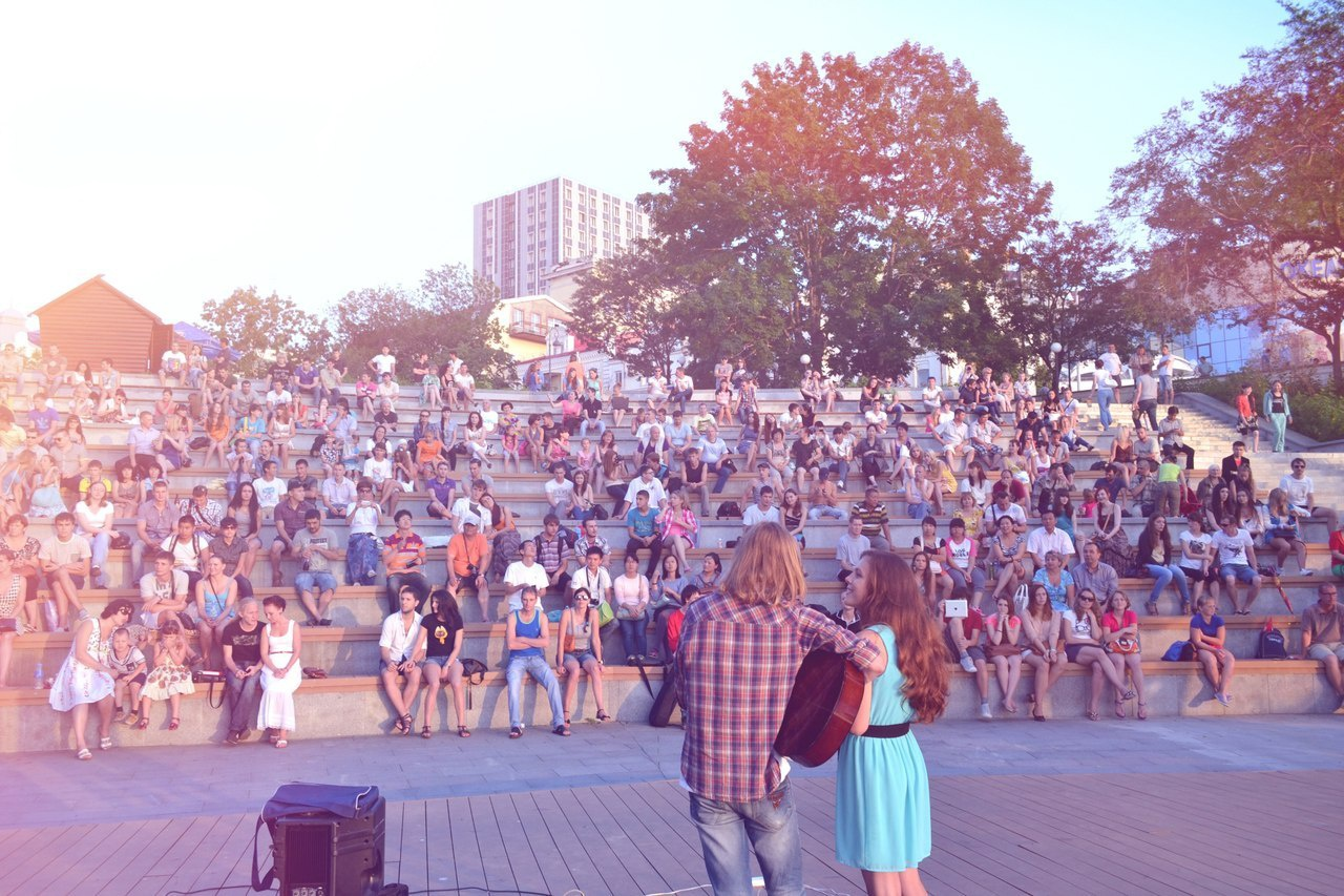 Толпа зрителей во Владивостоке